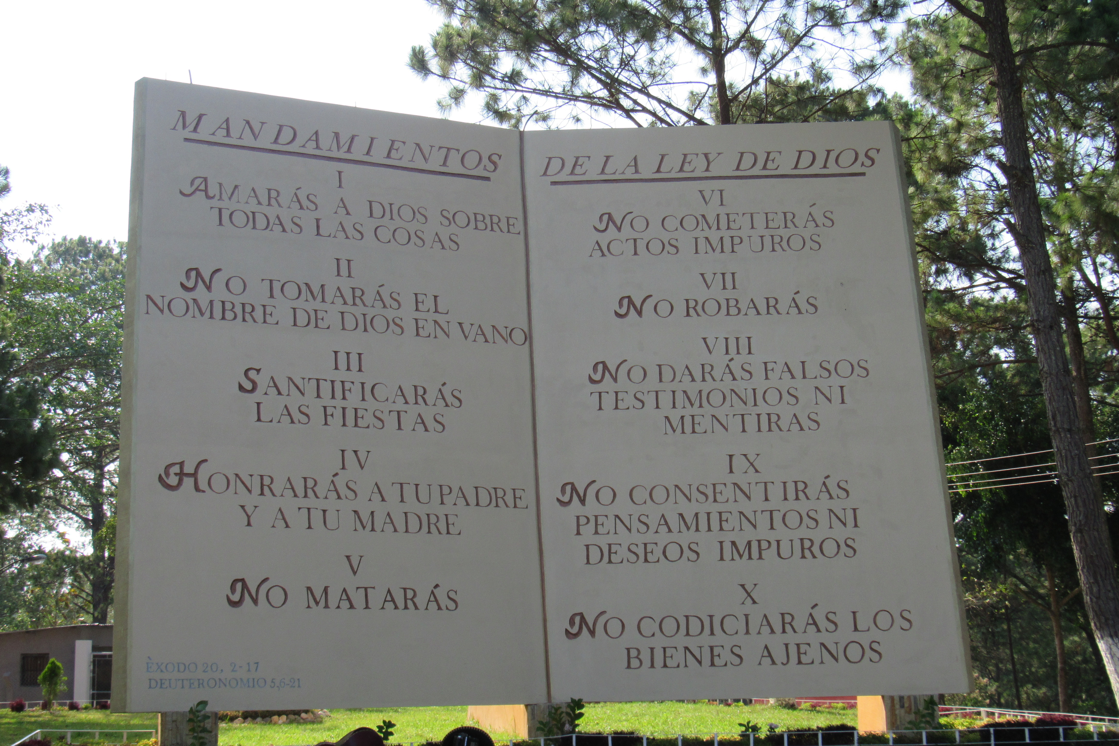 Una de las 3 esculturas de biblias mas grande de Latinoamérica Honduras